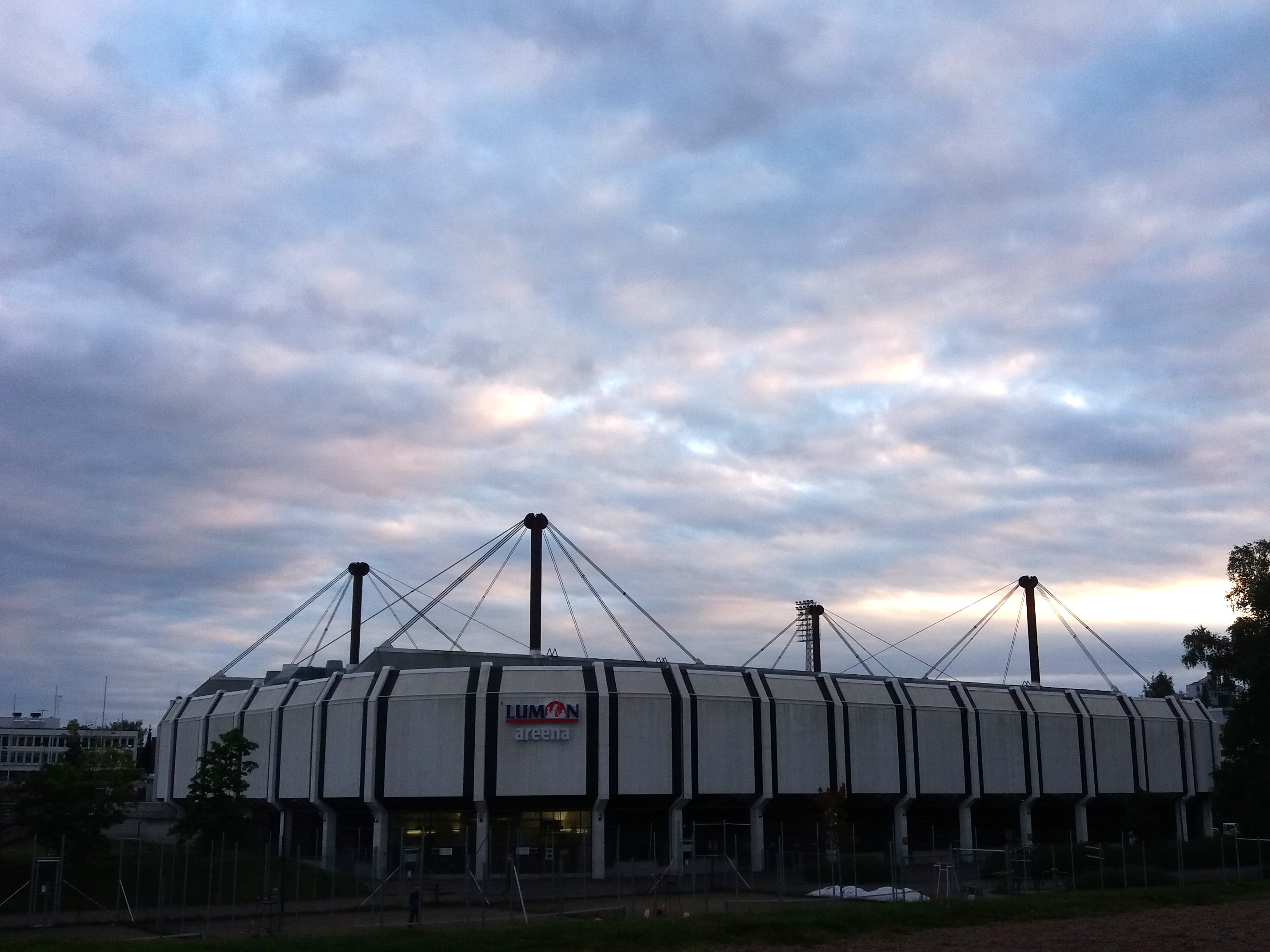 Lumon Areena syksyllä 2015.